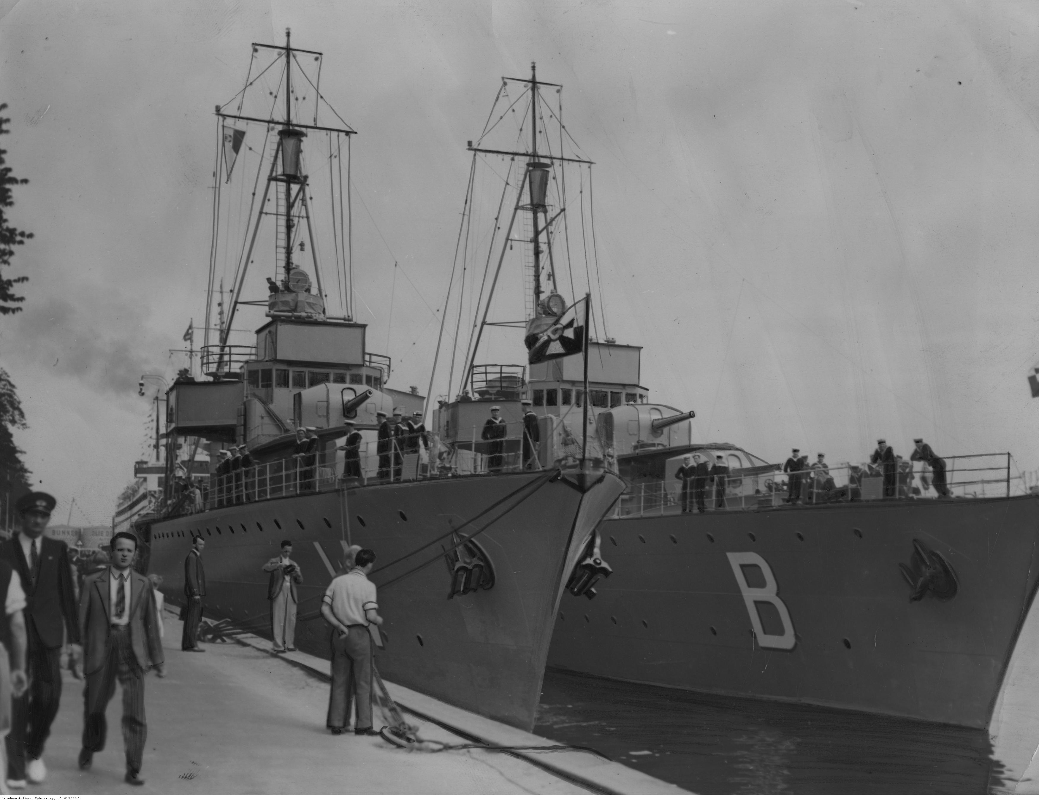 Niszczyciele ORP "Burza" i ORP "Wicher" zacumowane przy nadbrzeżu w Kopenhadze.